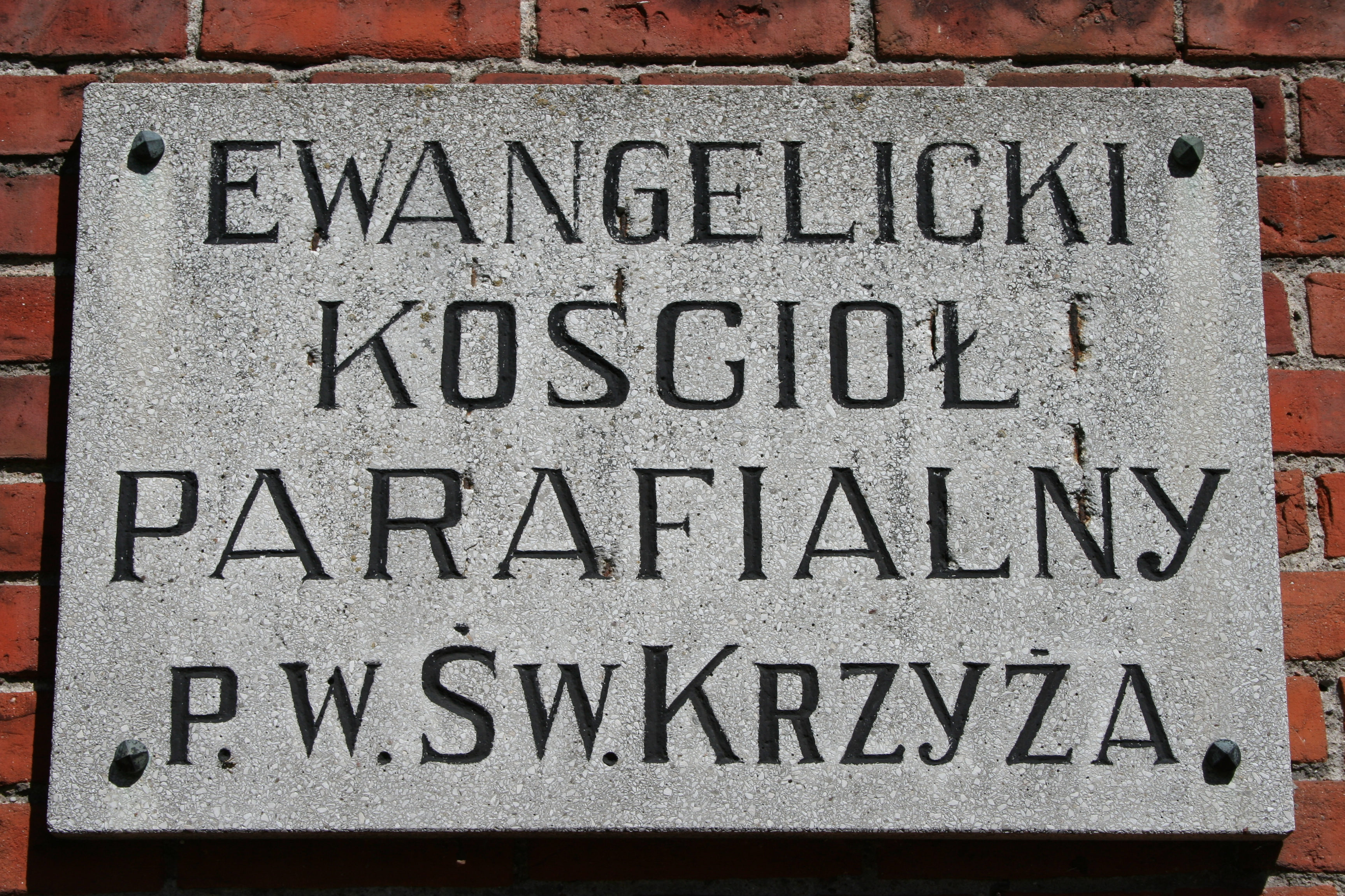 Nidzica, kościół ewangelicko-augsburski, 1858-1890